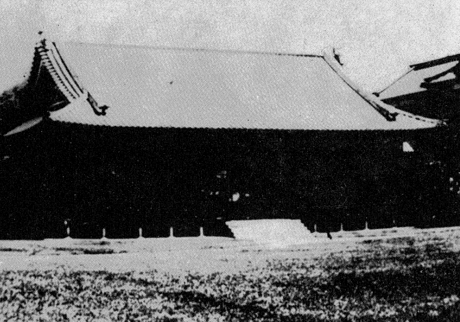 大正頃の、武庫離宮内部